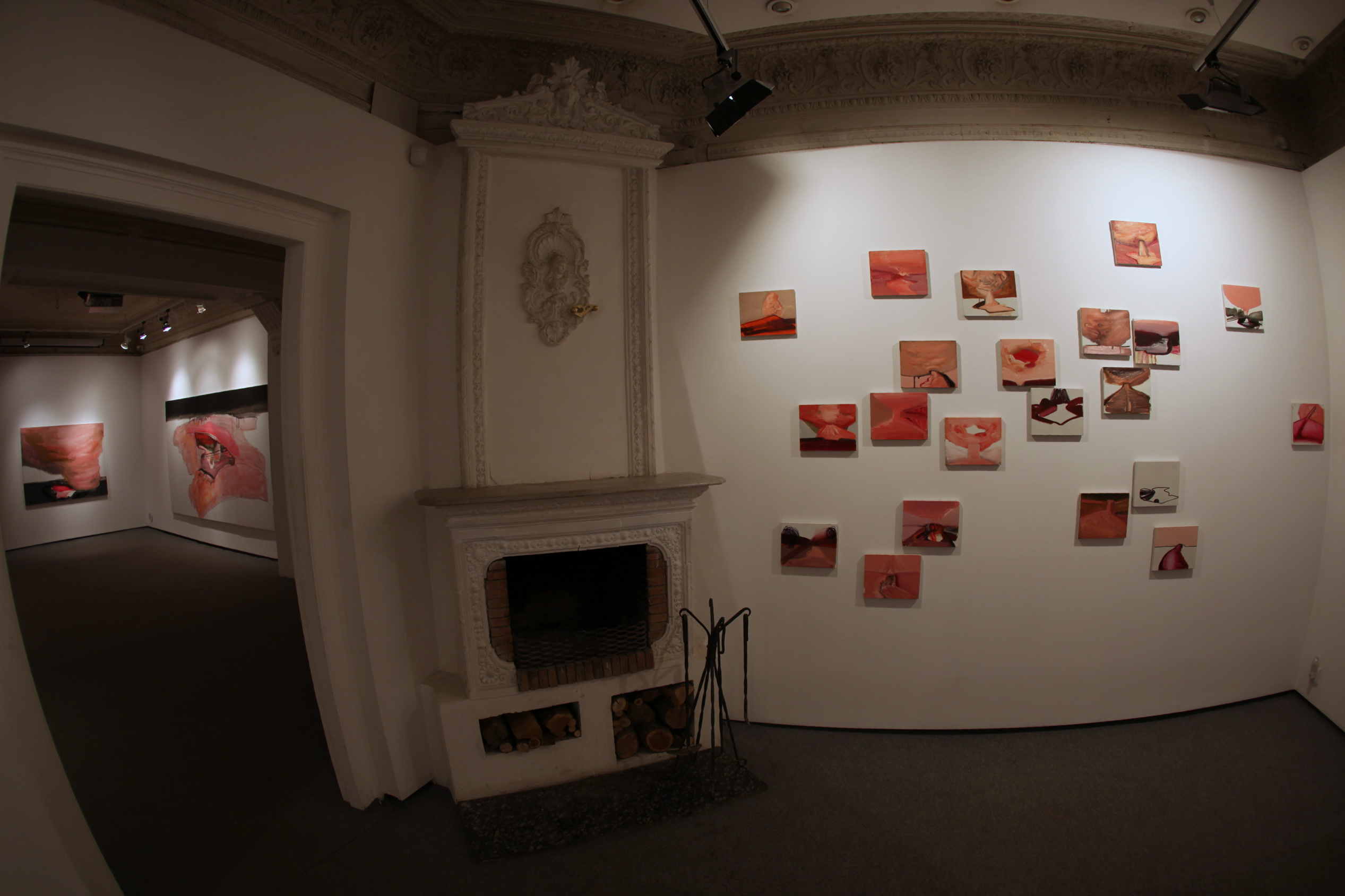 Влада Ралко "Поверхня", 2013